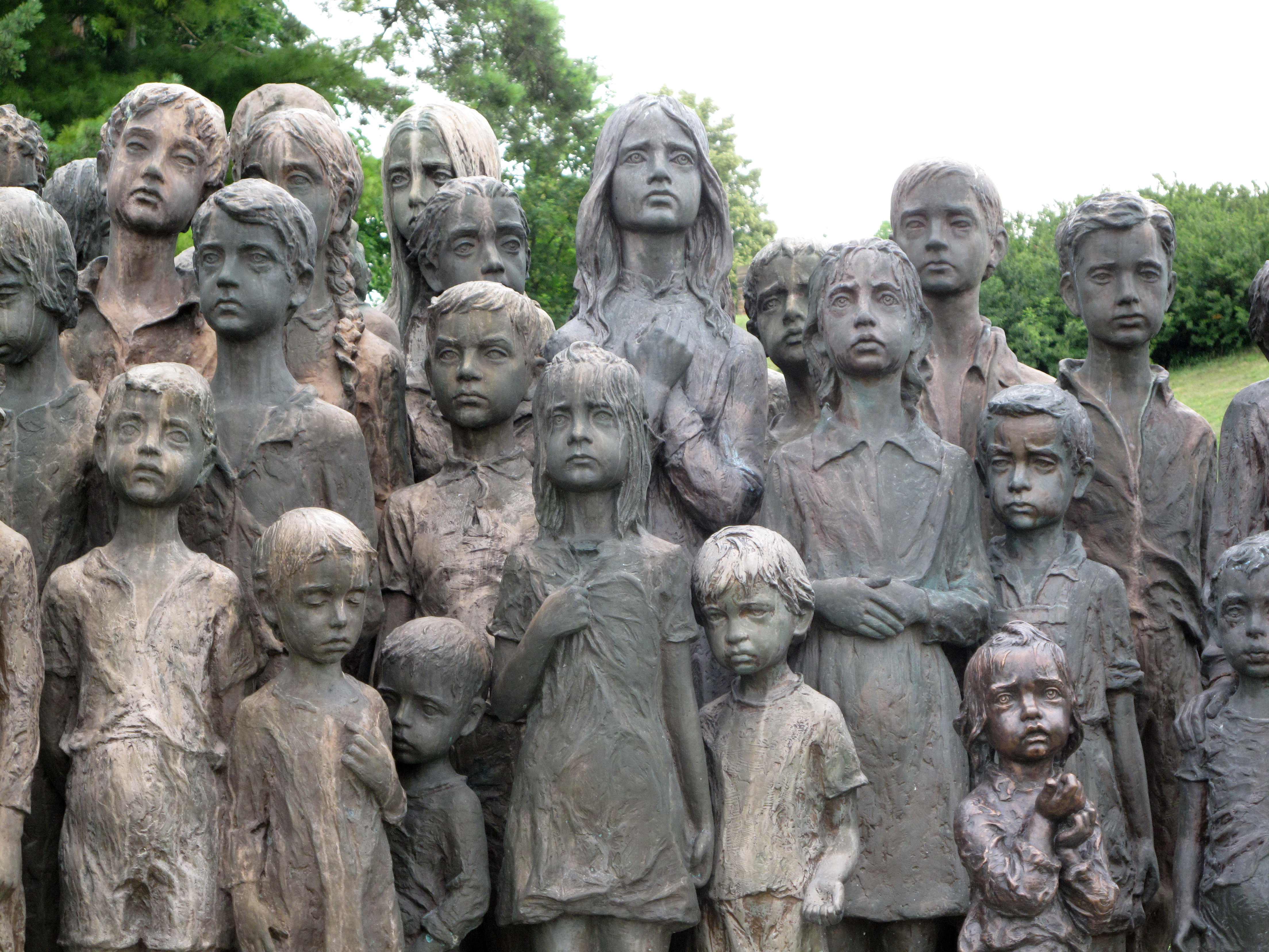 Lidice